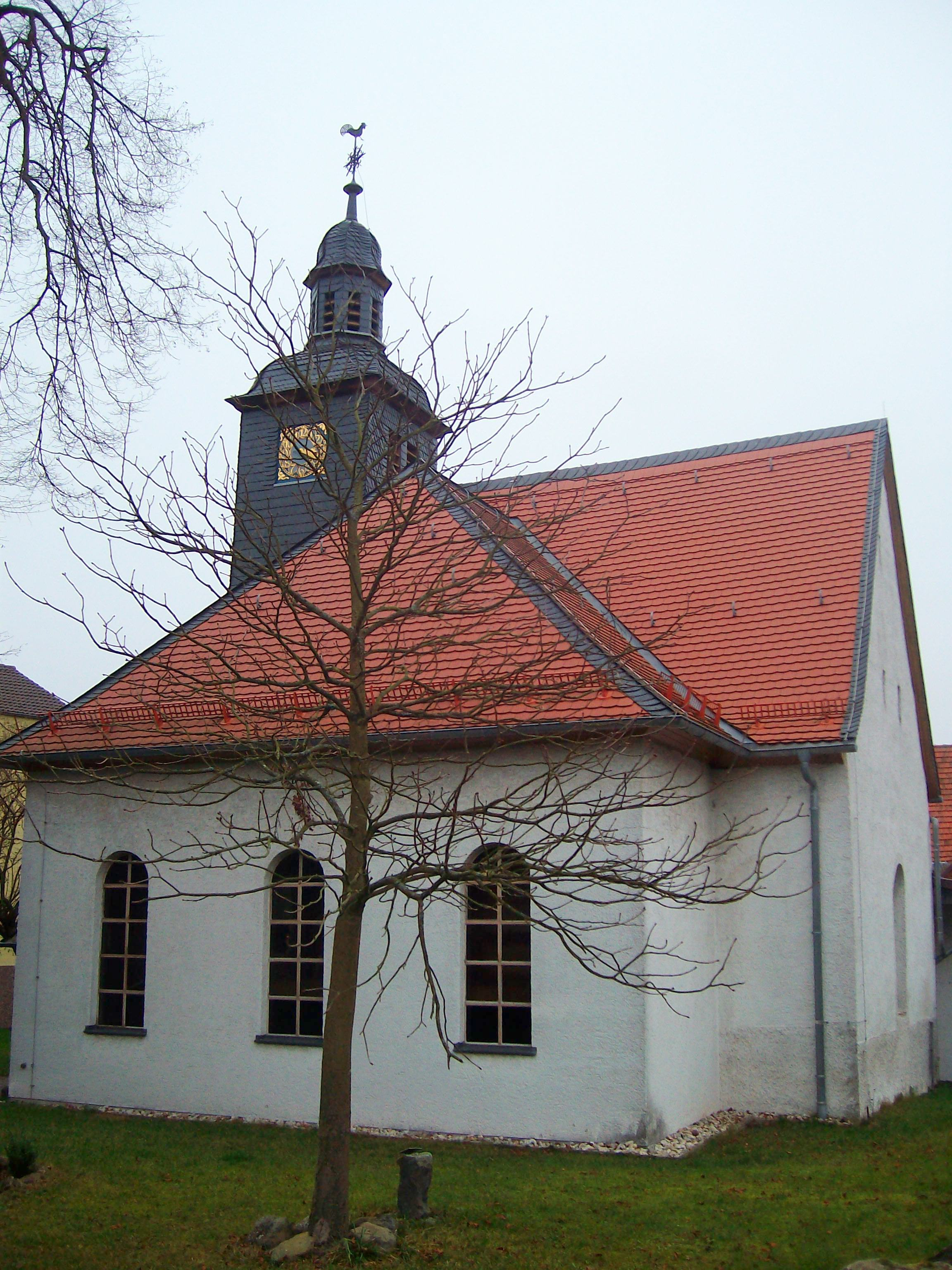 Evangelische Kirche Oppenrod, Gemeinde Buseck, Landkreis Gießen, Hessen, Deutschland